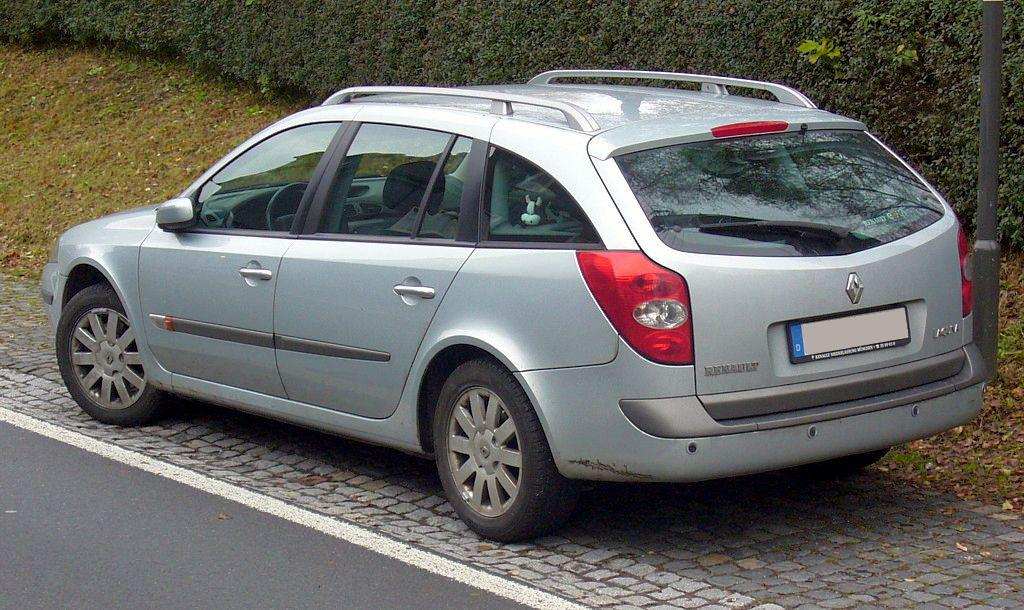 Renault Laguna II Grandtour Phase I